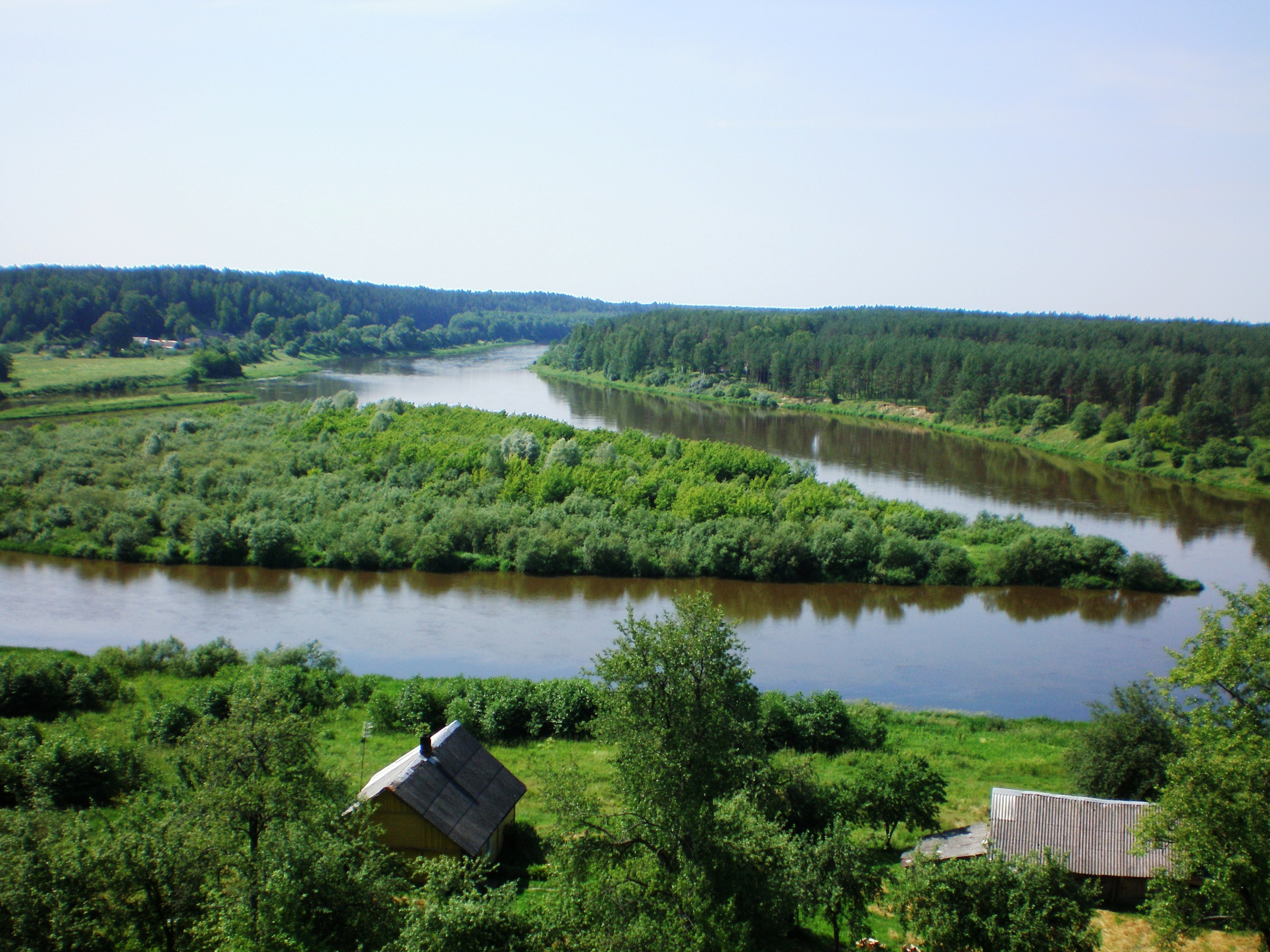 Nemuno ir Merkio santaka, Merkinė, Varėnos raj.